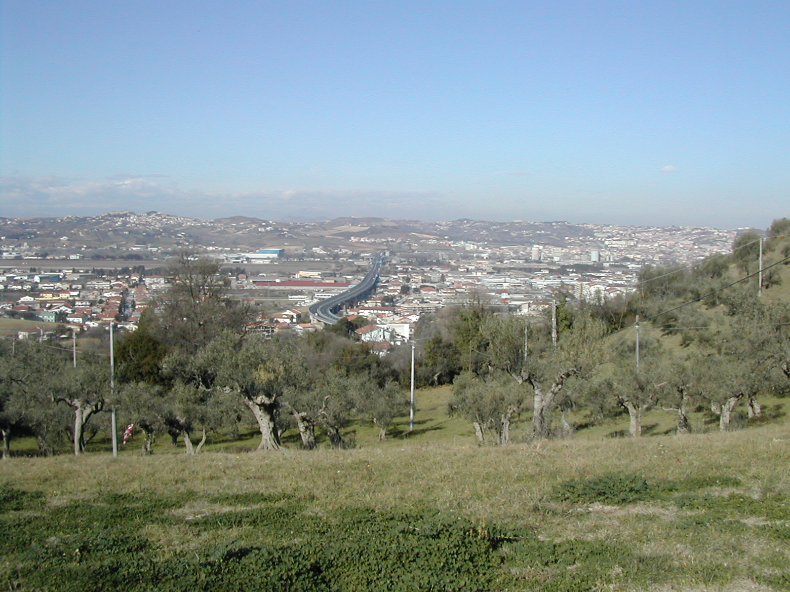 Panorama di Pescara dai colli del sud